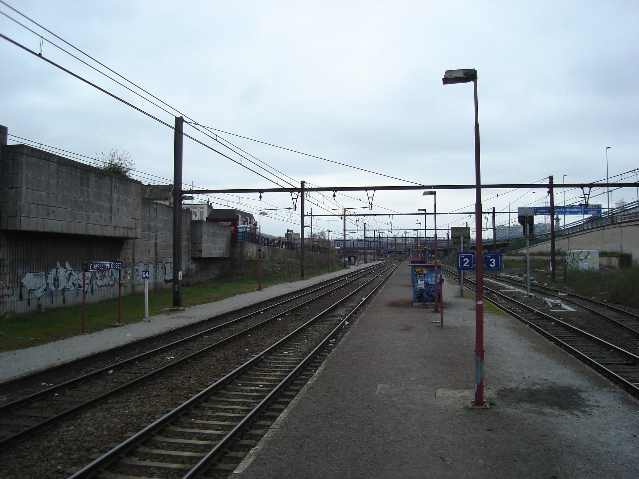 Vue de la gare de Charleroi-Ouest, sur la ligne SNCB 140 Ottignies - Charleroi.